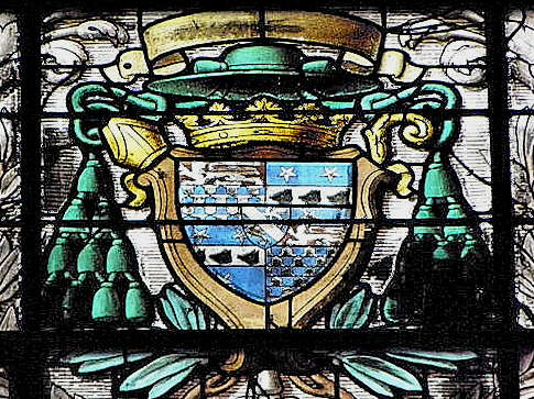 Armes d'Aymar Hennequin. Vitrail de la métropole Saint-Pierre de Rennes (35). Descriptif du blazon : écartelé : aux 1er et 4ème, vairé d'or et d'azur, au chef de gueules chargé d'un lion léopardé d'argent (qui est Hennequin) ; aux 2ème et 3ème, d'azur à la fasce d'argent chargée de trois hures de sanglier de sable, accompagnée de trois étoiles d'or, deux en chef, une en pointe (qui est Nicolaï ou Gobaille); sur le tout : d'azur à la bande d'argent accostée de deux dragons d'or (qui est Baillet).